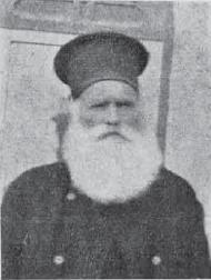 Лазар Замфиров